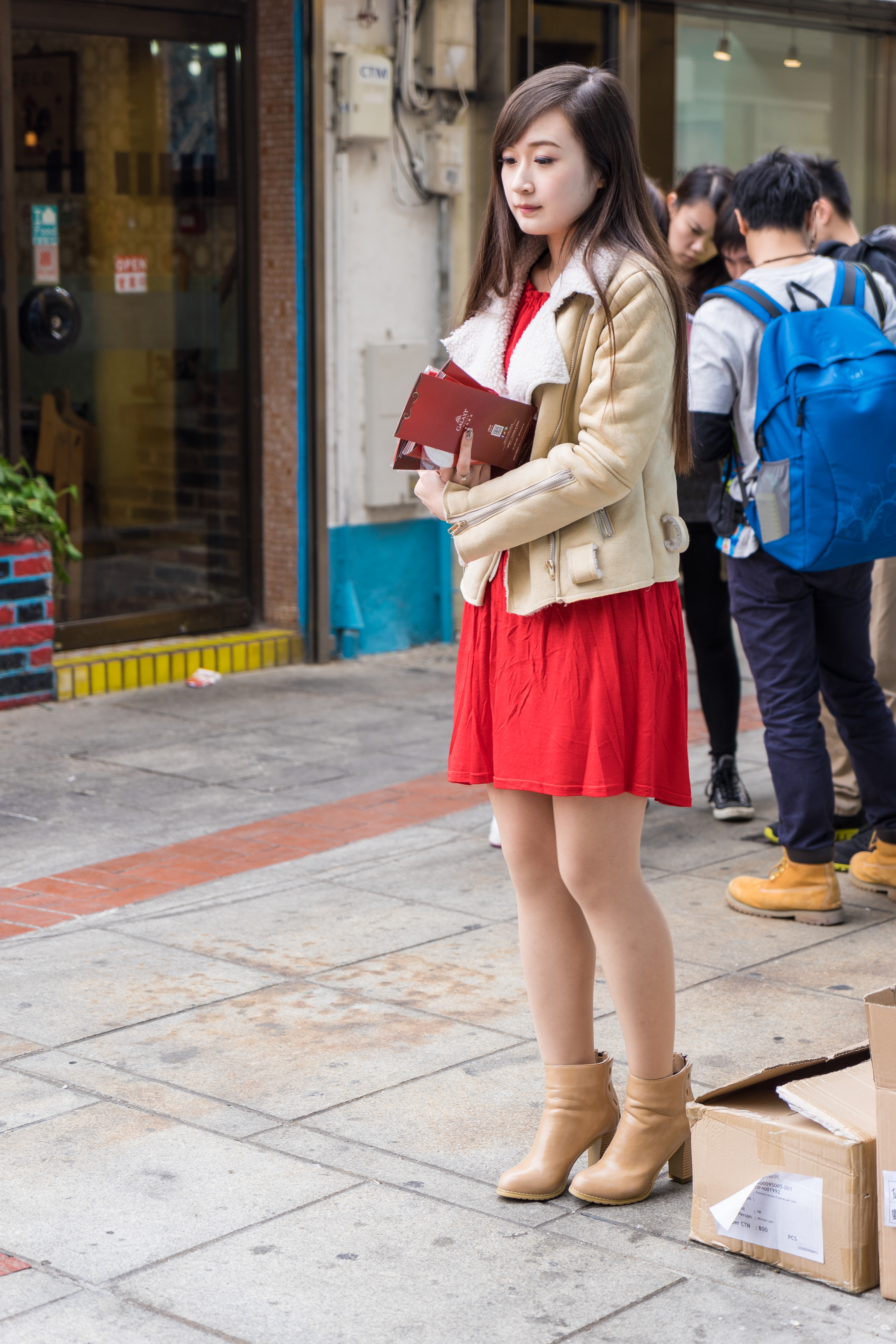 Rua do Cunha